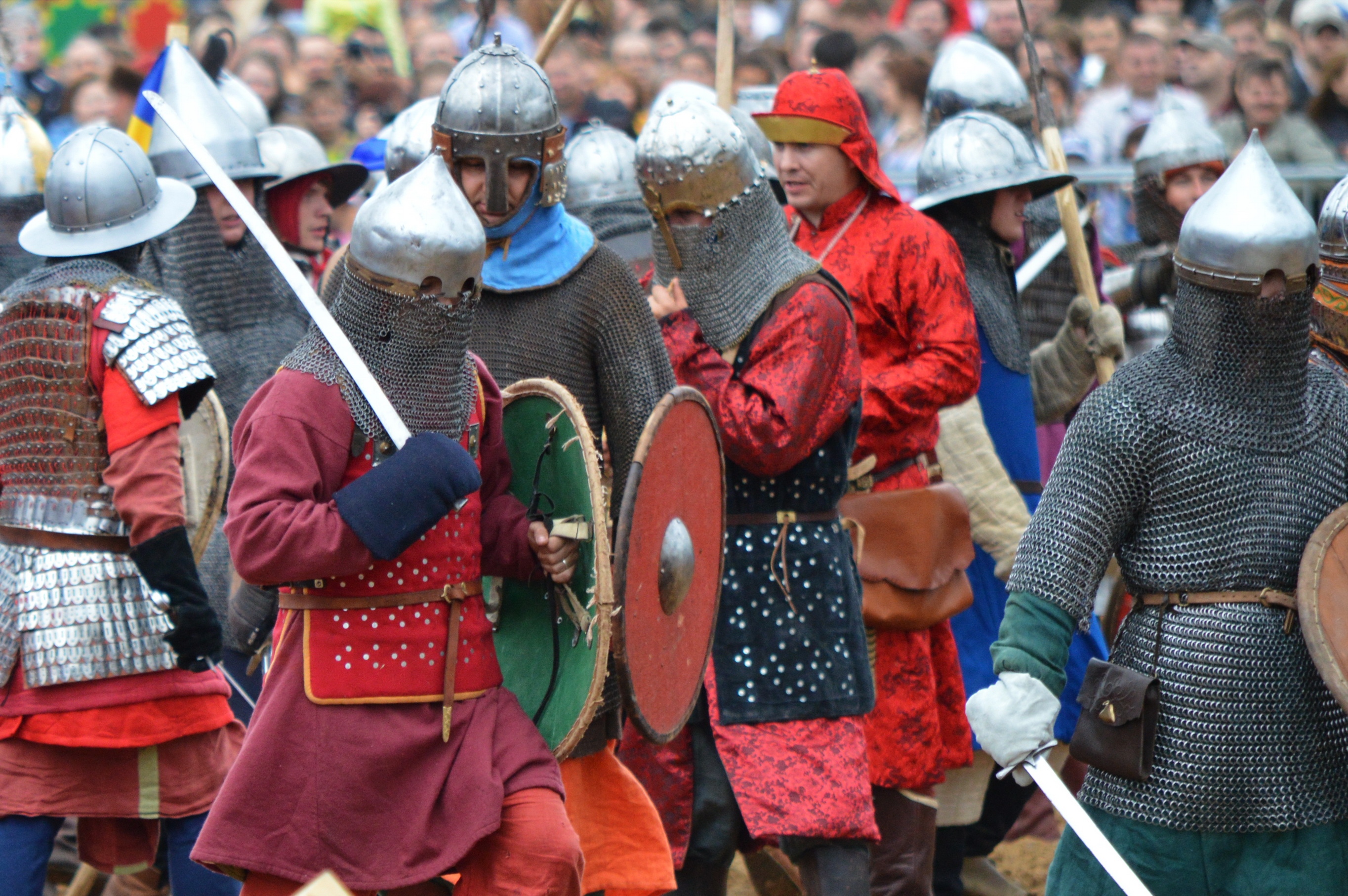 Фестиваль исторической реконструкции "Времена и эпохи" в Коломенском.